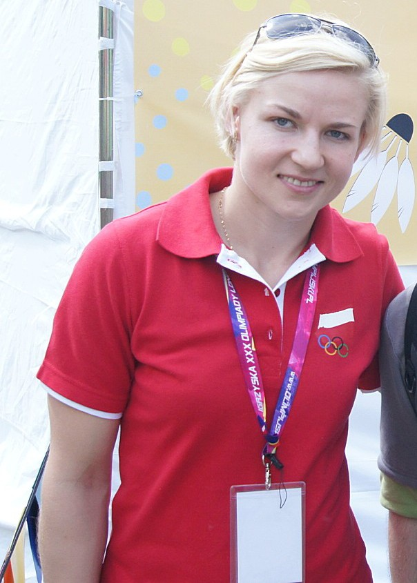 Nadieżda Zięba, polish badminton player.